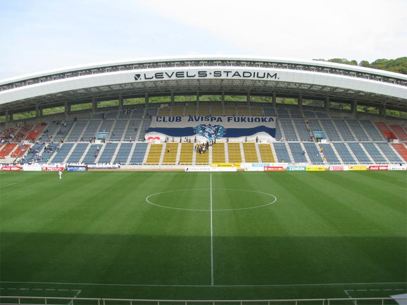 LEVEL5 STADIUM レベルファイブ スタジアム ADDRESS 2-1-1 Higashi Hirao Kouen,Hakata-ku, Fukuoka-shi,Fukuoka, 816-0052,JAPAN 住所 〒816-0052 福岡市博多区東平尾公園2丁目1番1号